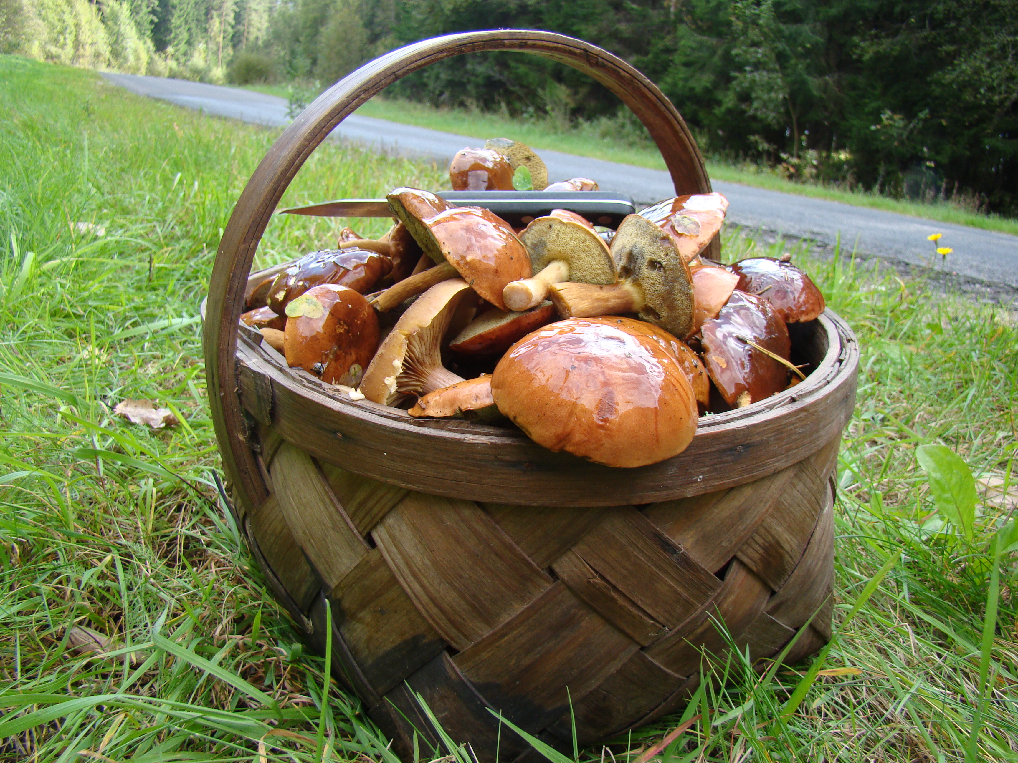 Das Sammeln von Speisepilzen.